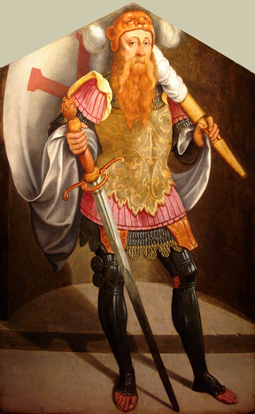 Portrait of Godfrey de Bouillon (c.1060-1100)